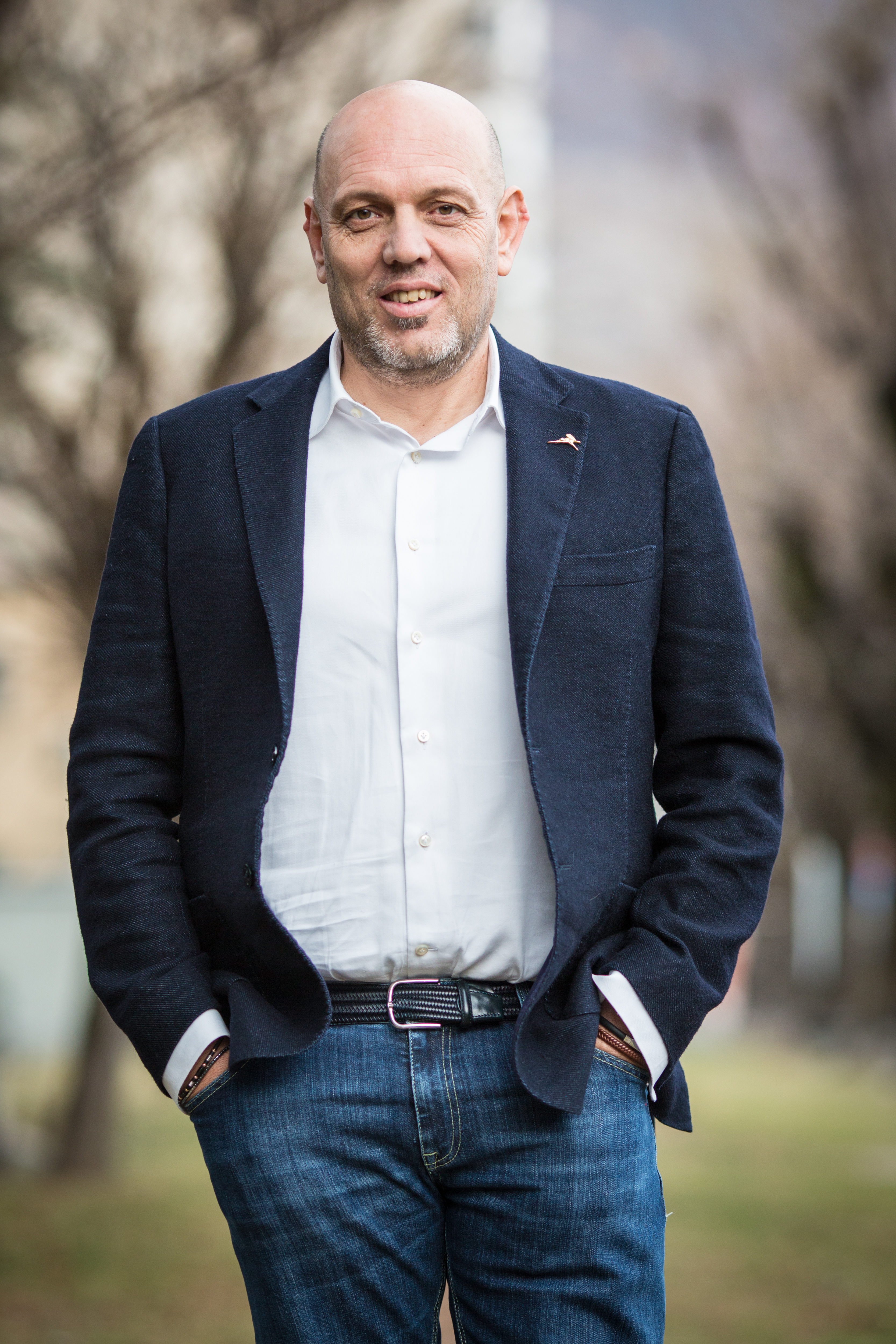 Massimo Sertori